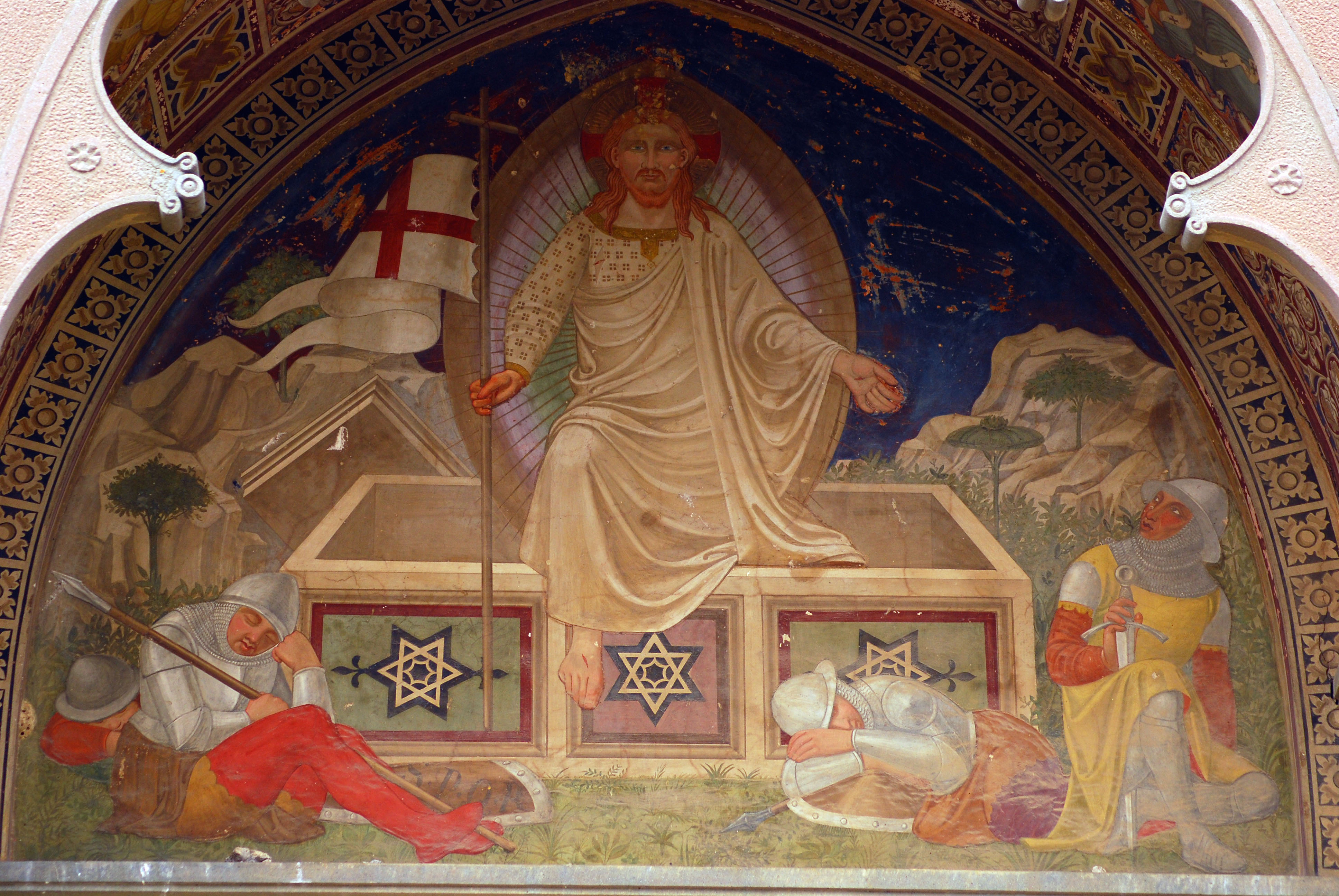 Affreschi di Gaetano Bianchi sulla lunetta della Cappella Gentilizia Corsini (Villa Le Corti), San Casciano Val di Pesa.